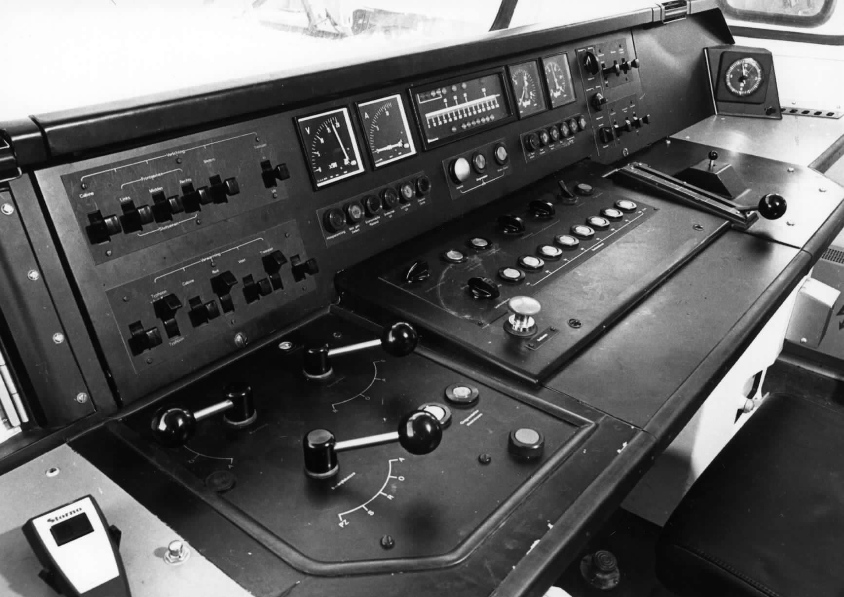 Afbeelding van de cabine (stuurstand) van een electrisch treinstel (Plan Y Sprinter) van de N.S..